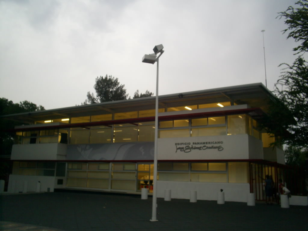 Edificio Panamericano (Unidad Revolución)